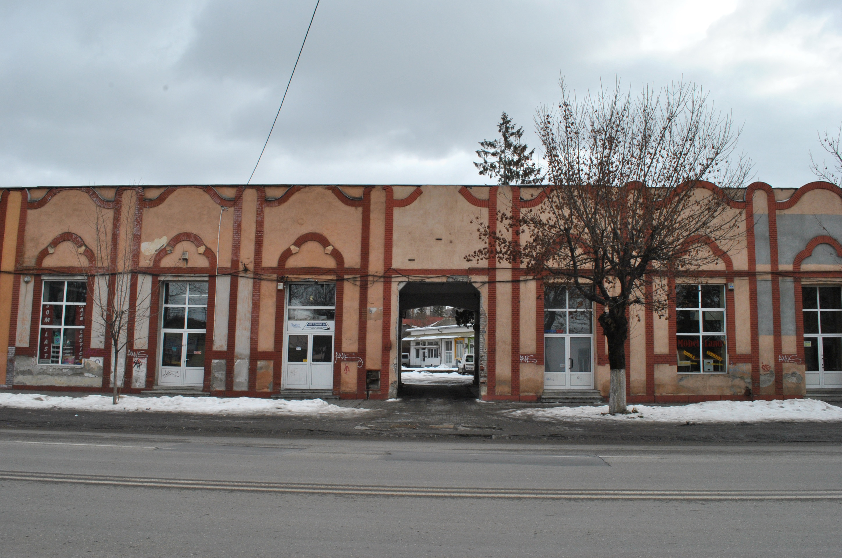 Ateliere pentru micii meseriași, azi magazine, 1902